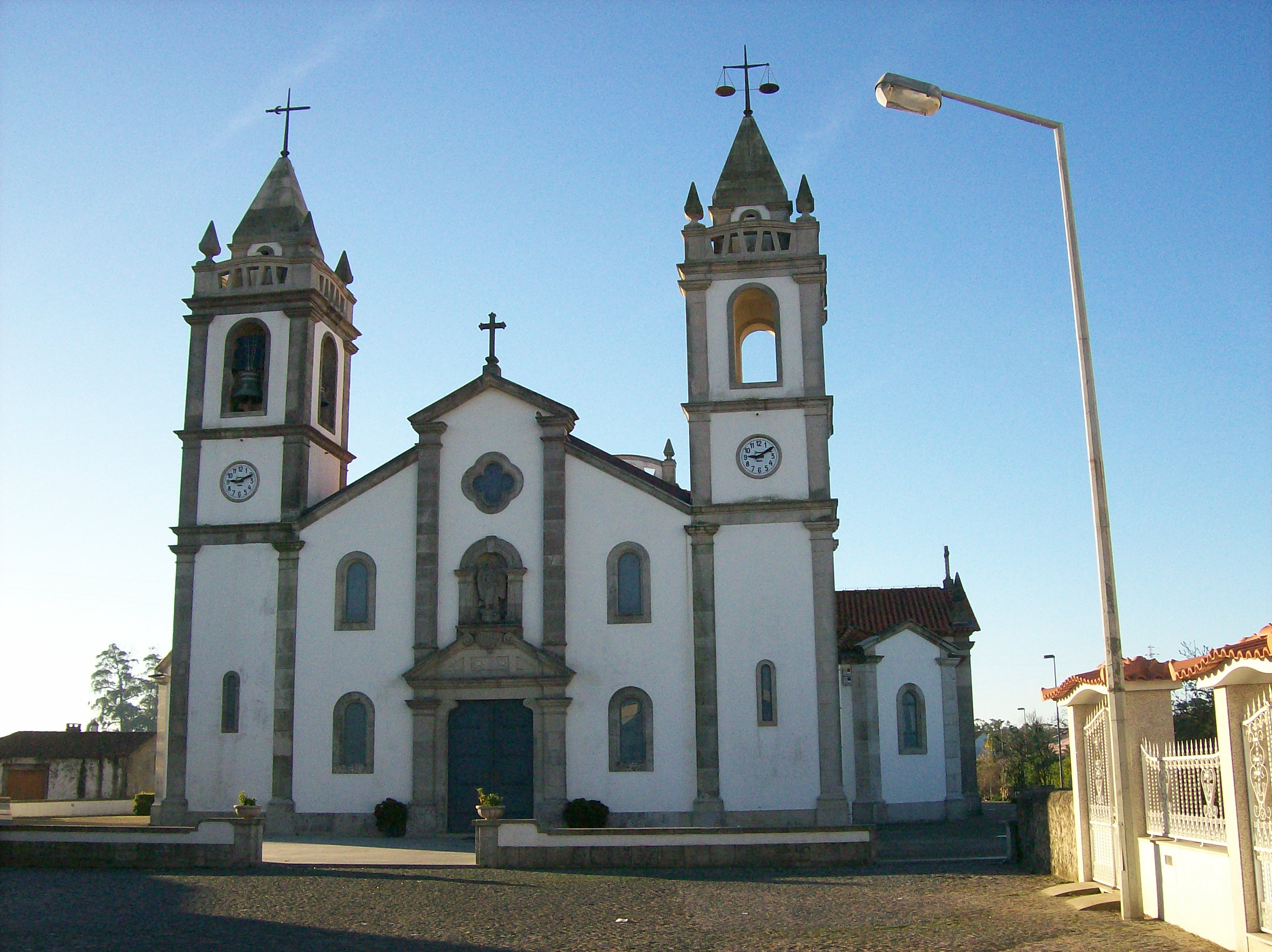 Apulia's igreja